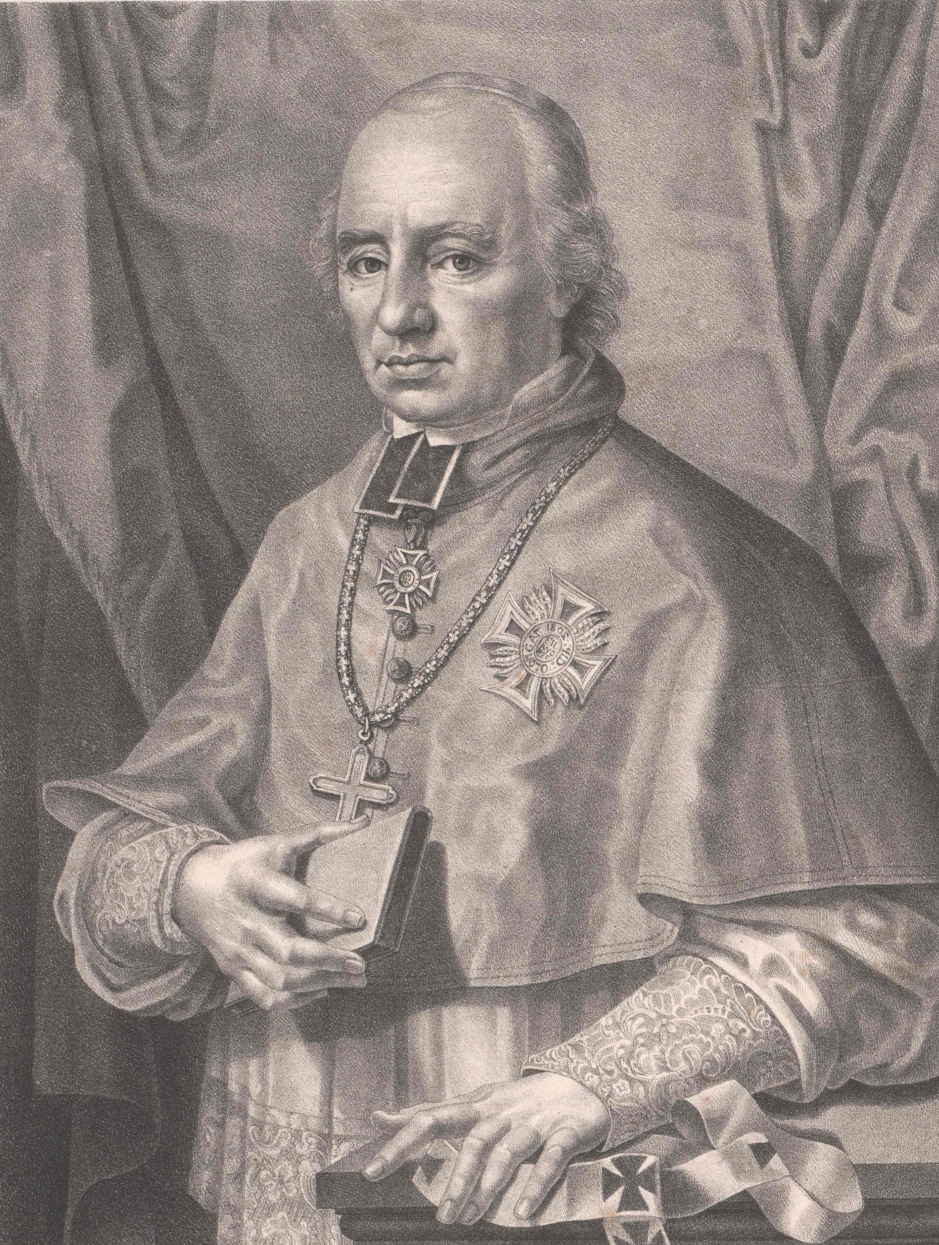 Alois Josef Krakovský z Kolovrat (1759–1833)